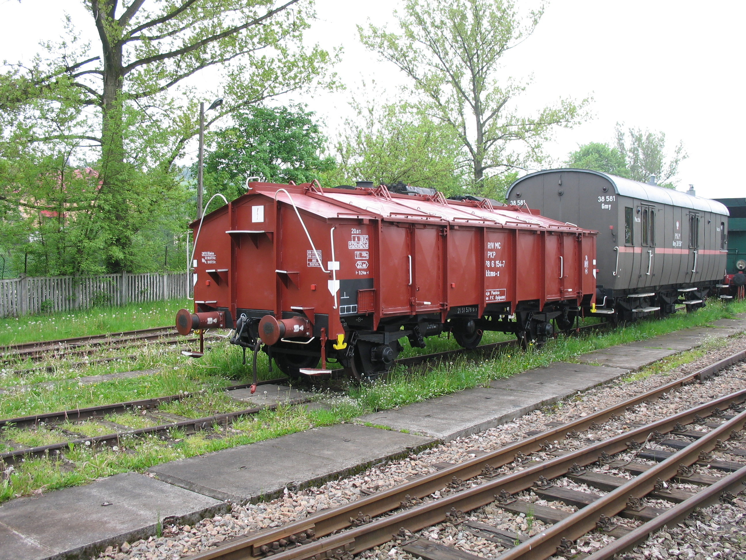 Wagon kolejowy z otwieranym dachem typu Tikkms-x i wagon pocztowy typu Gmy (numer 38581, zbudowany w 1906 roku). Eksponaty skansenu taboru kolejowego w Chabówce